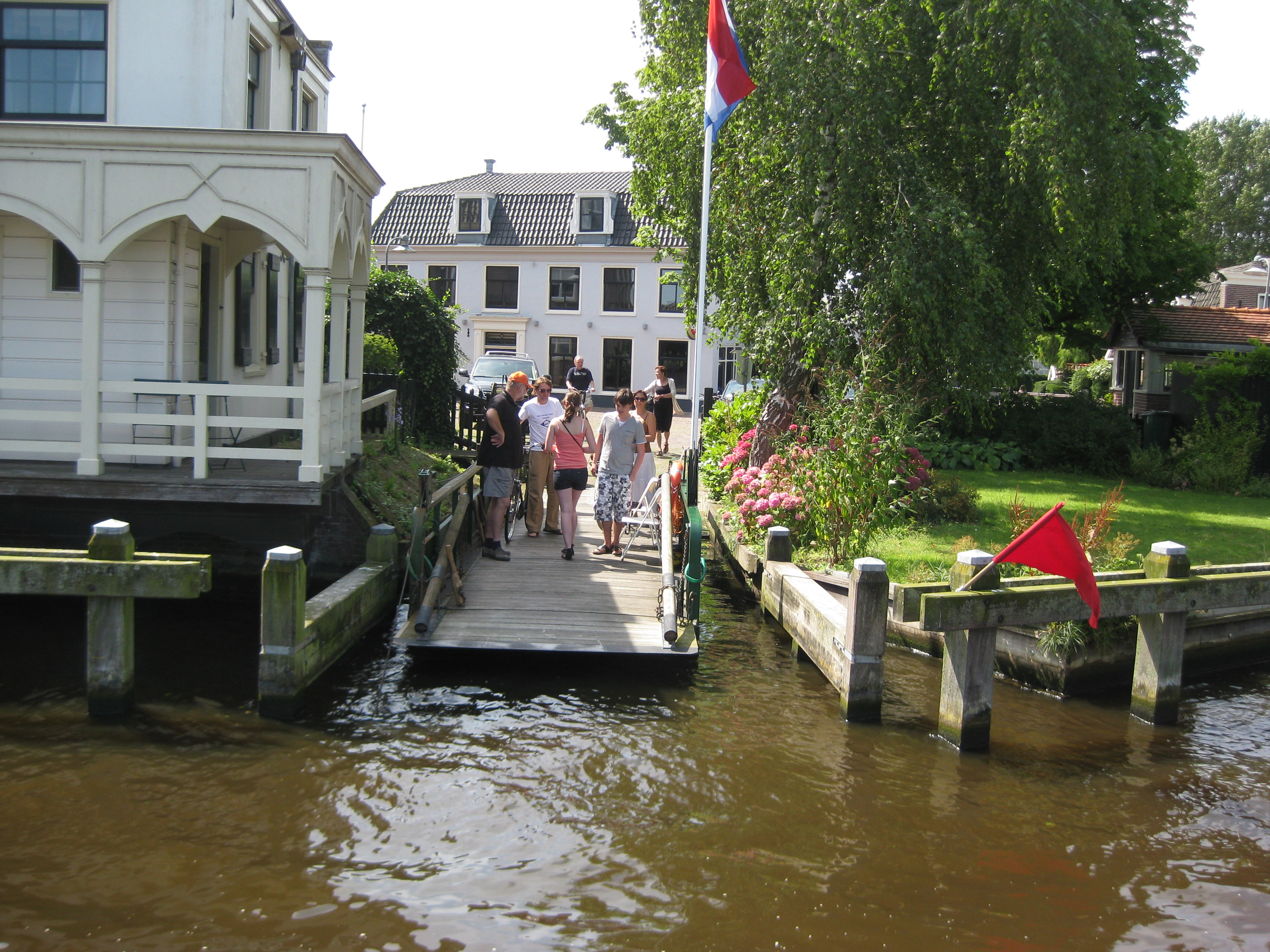 Fiets en voetgangerspontje over de Amstel in Ouderkerk aan de Amstel